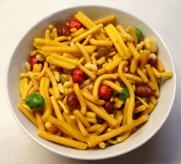 A bowl of bombay mix.